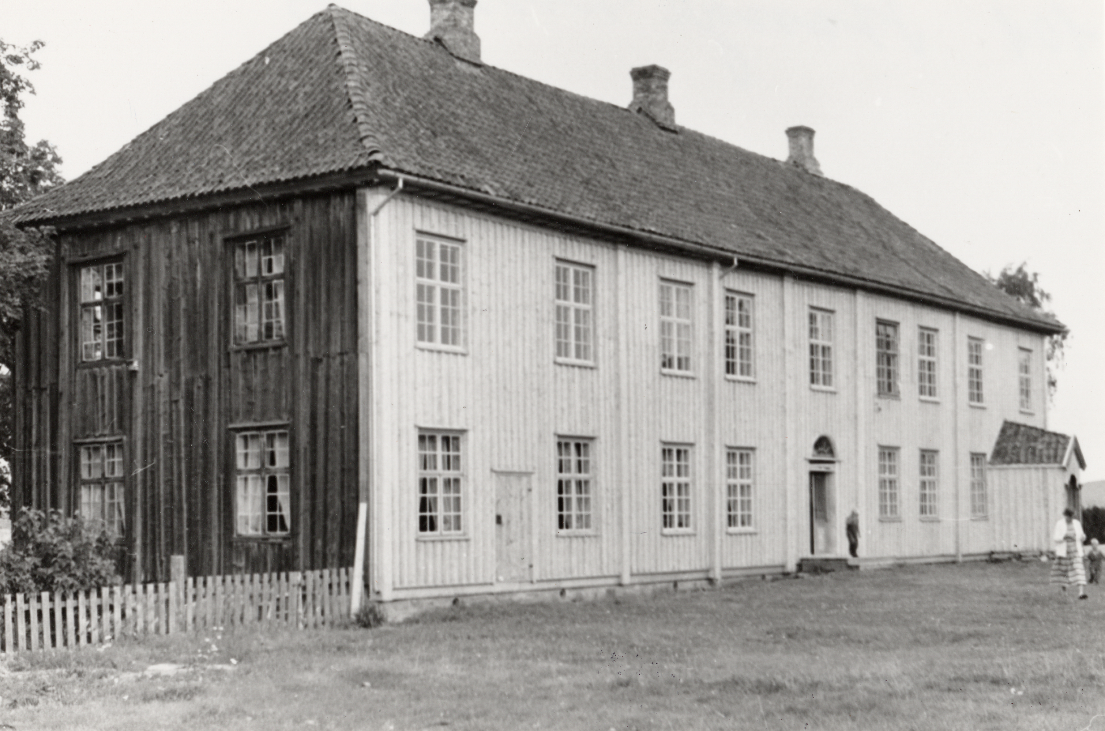 Ringnes i Ottestad, Hedmark